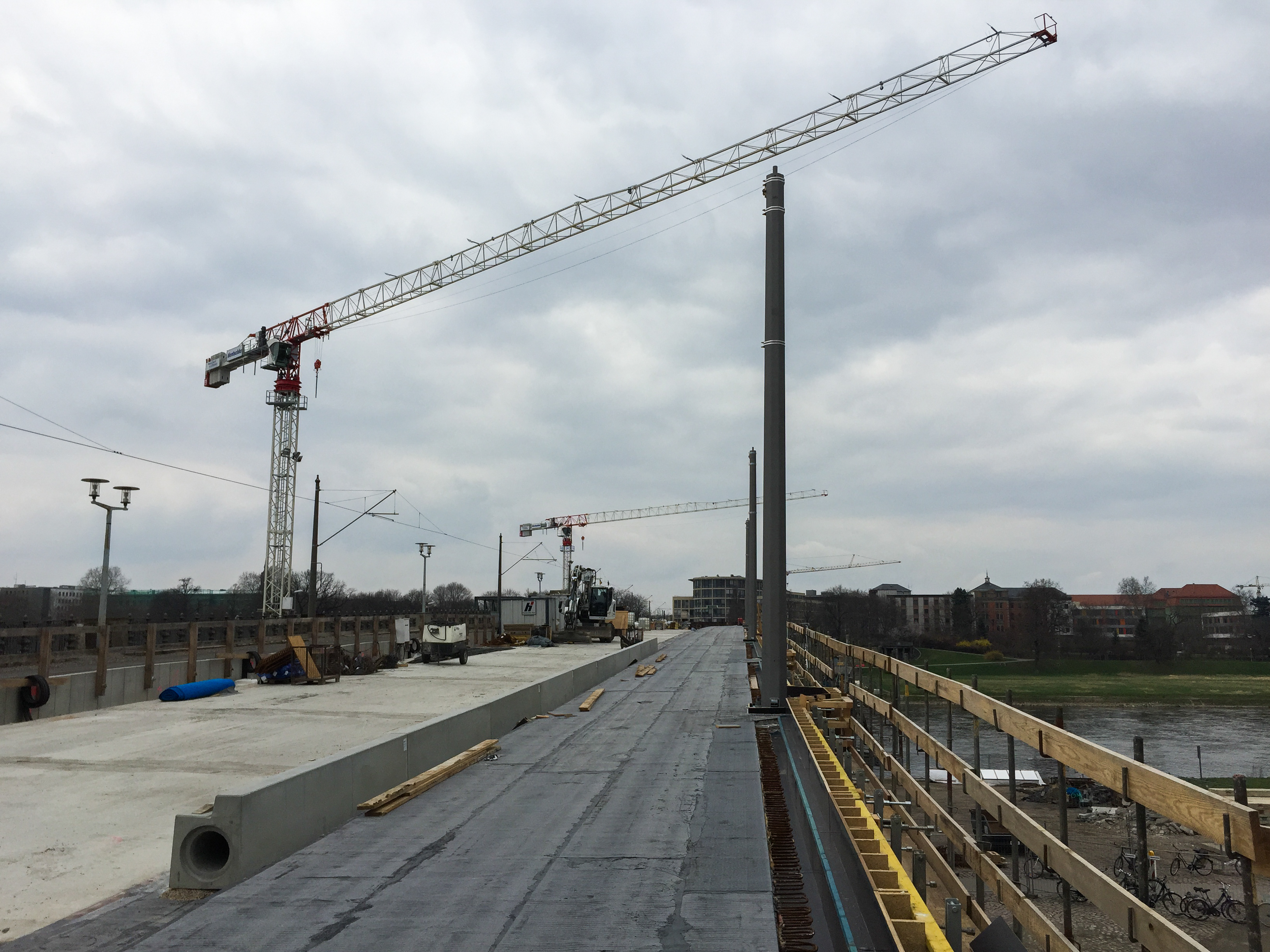 Baustelle Albertbrücke Dresden